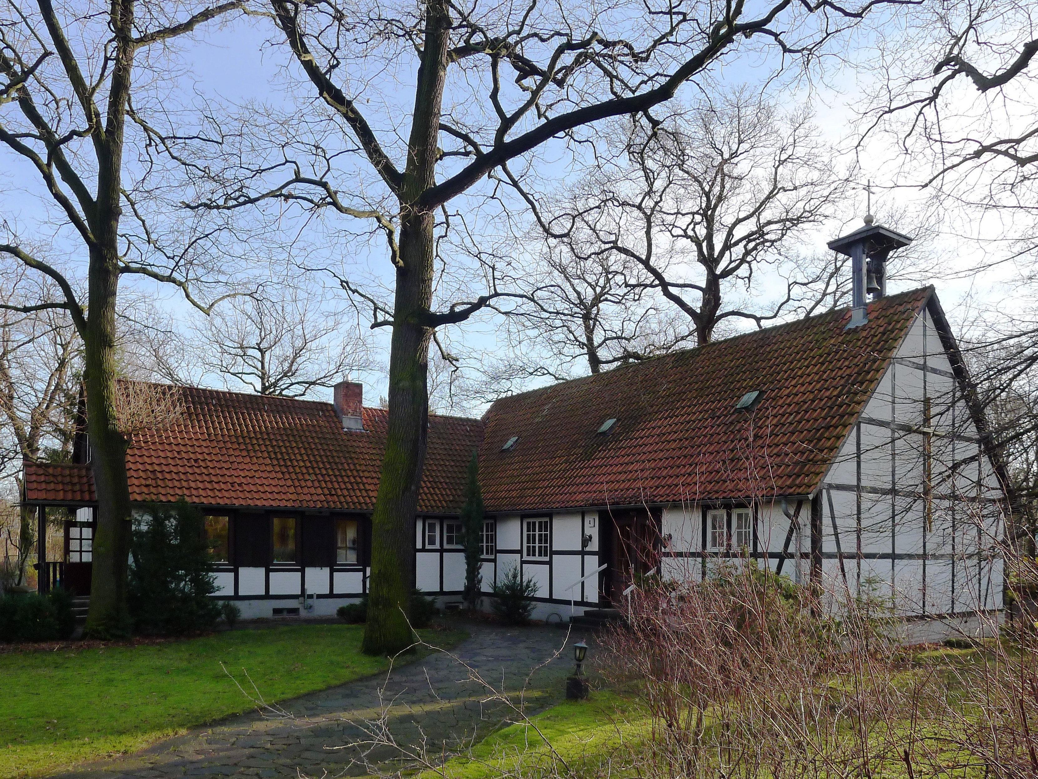 Kirche und Kindergarten